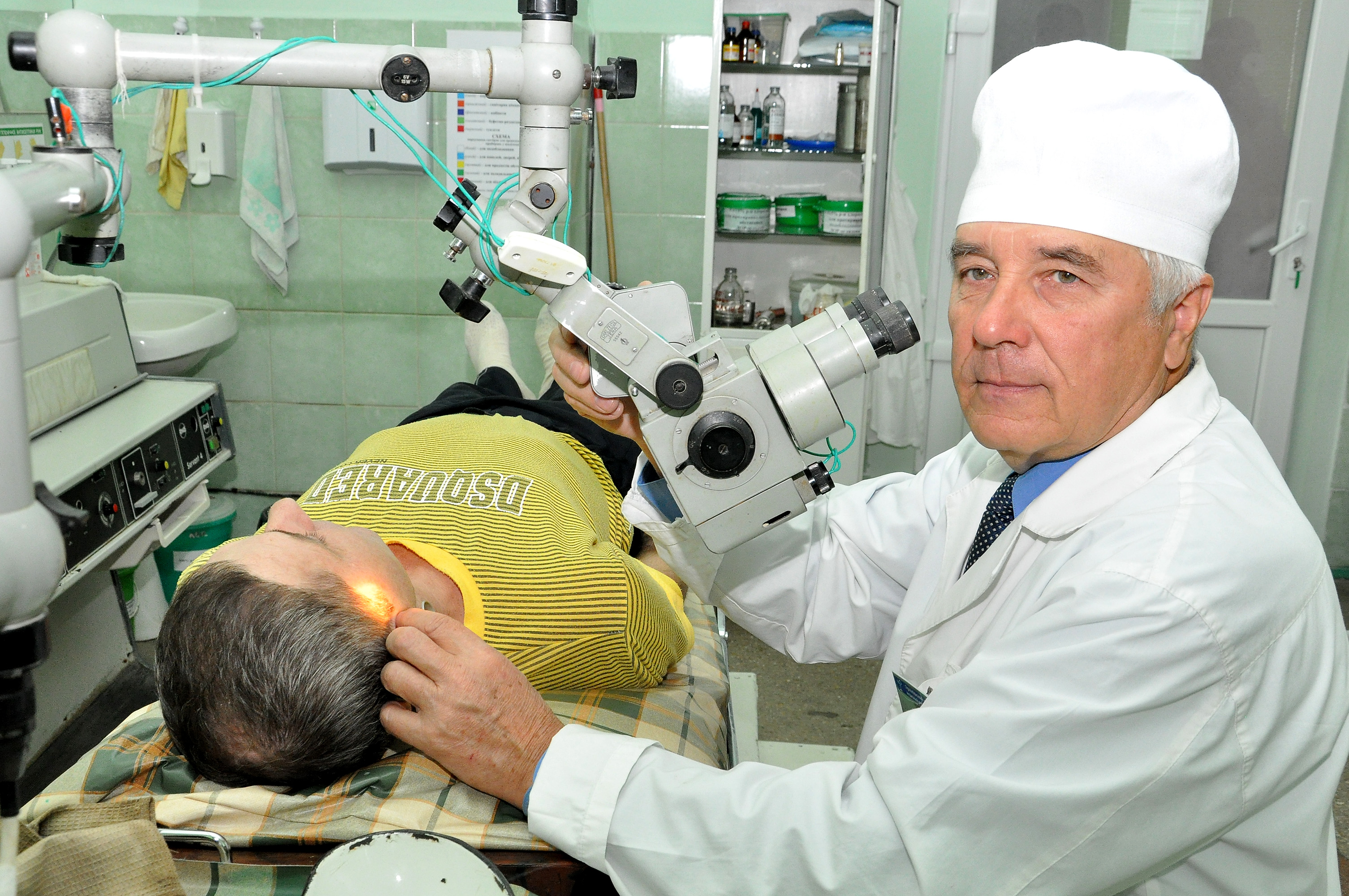 Український вчений у галузі медицини, отоларинголог Петро Ковалик обстежує пацієнта в отоларингологічному відділенні Тернопільської університетської лікарні.